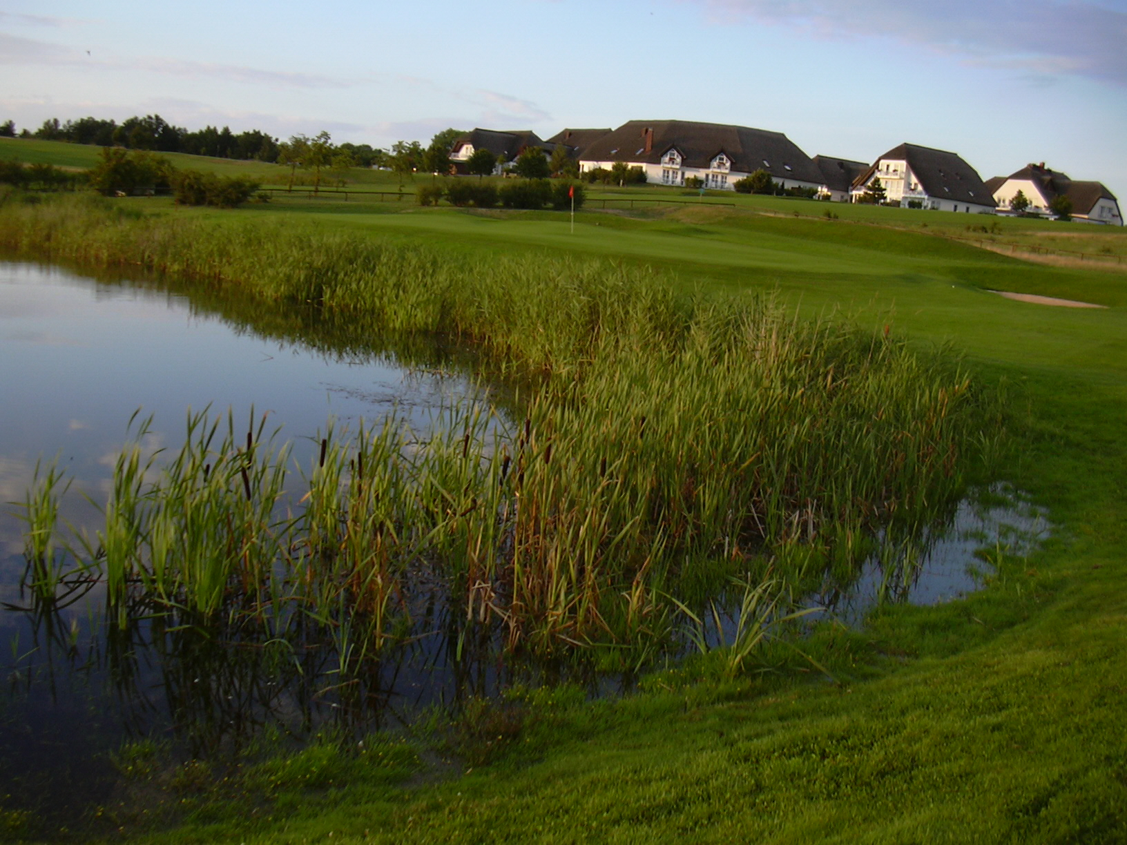 Golfpark Balmer See, Achterwasser, Mecklenburg-Vorpommern, Deutschland.